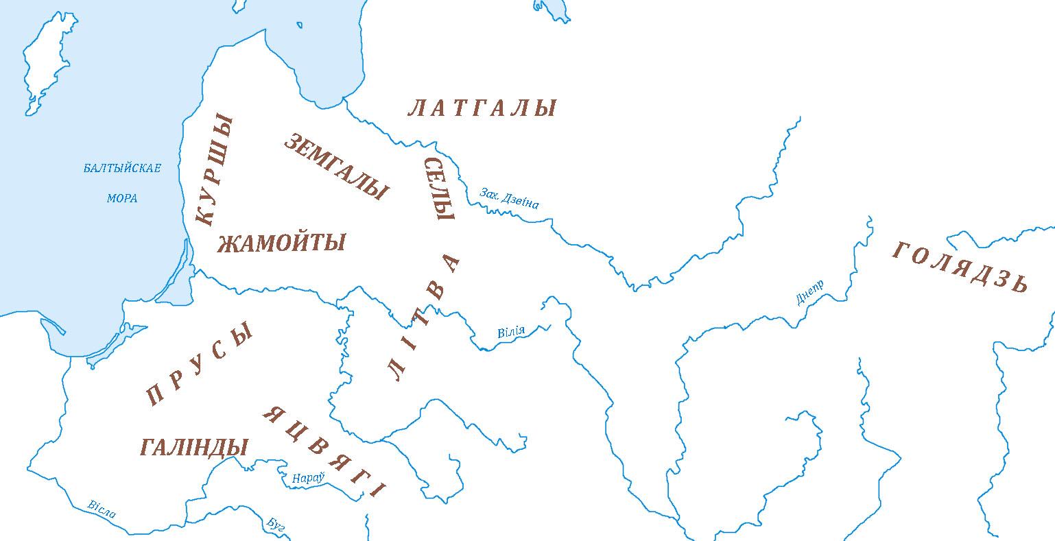 Балцкія плямёны ў X - XII стст.